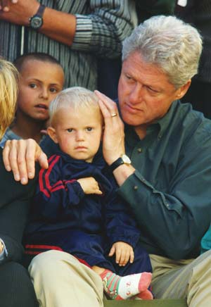 Clinton in Kosovo